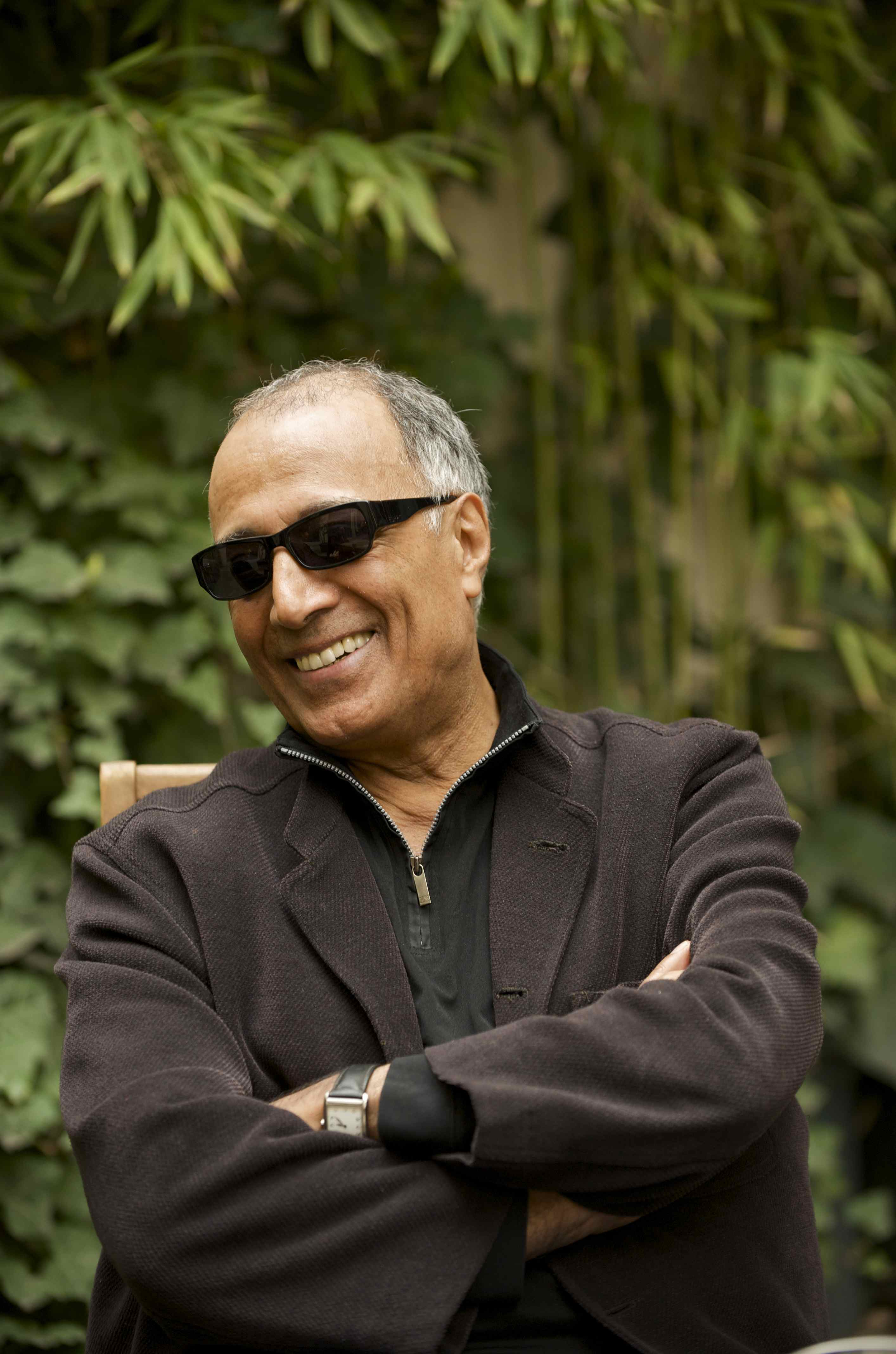 abbas-kiarostami-par-marion-stalens